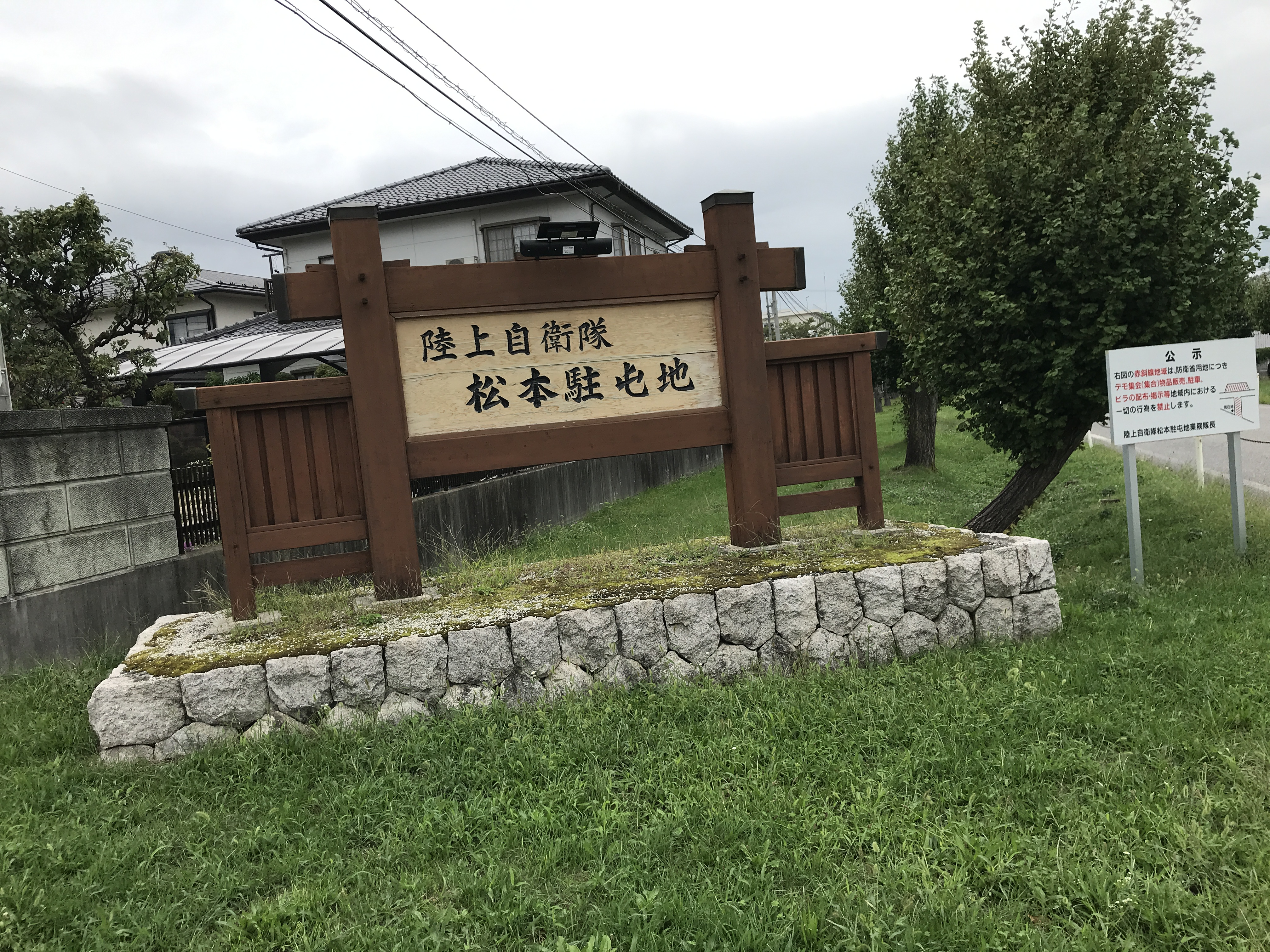 陸上自衛隊 松本駐屯地の正門付近にある野立看板